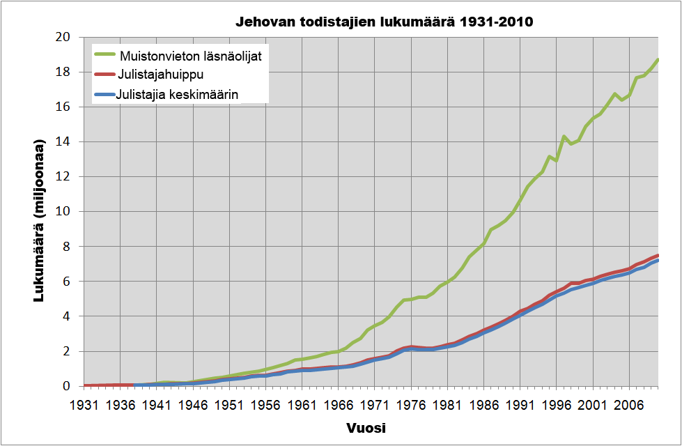 Aktiivisten jehovan todistajien lukumäärät ja muistonvieton läsnäolijamäärä.